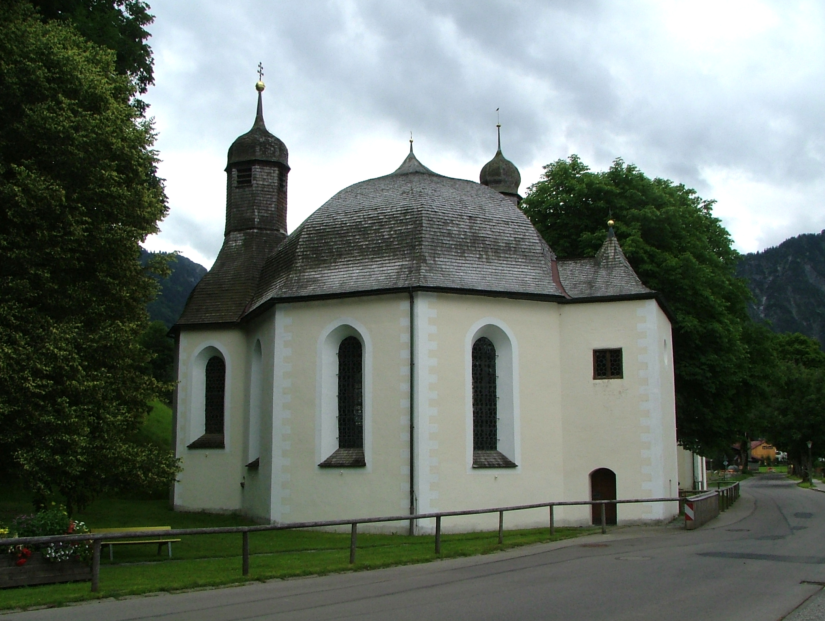 Loreto